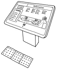 ภาพแสดงป้ายให้ข้อมูลอาคารมีทั้งแผนผังตามสัมผัส มีอักษรเบรลล์กำกับและมีปุ่มกดเพื่อฟังเสียง